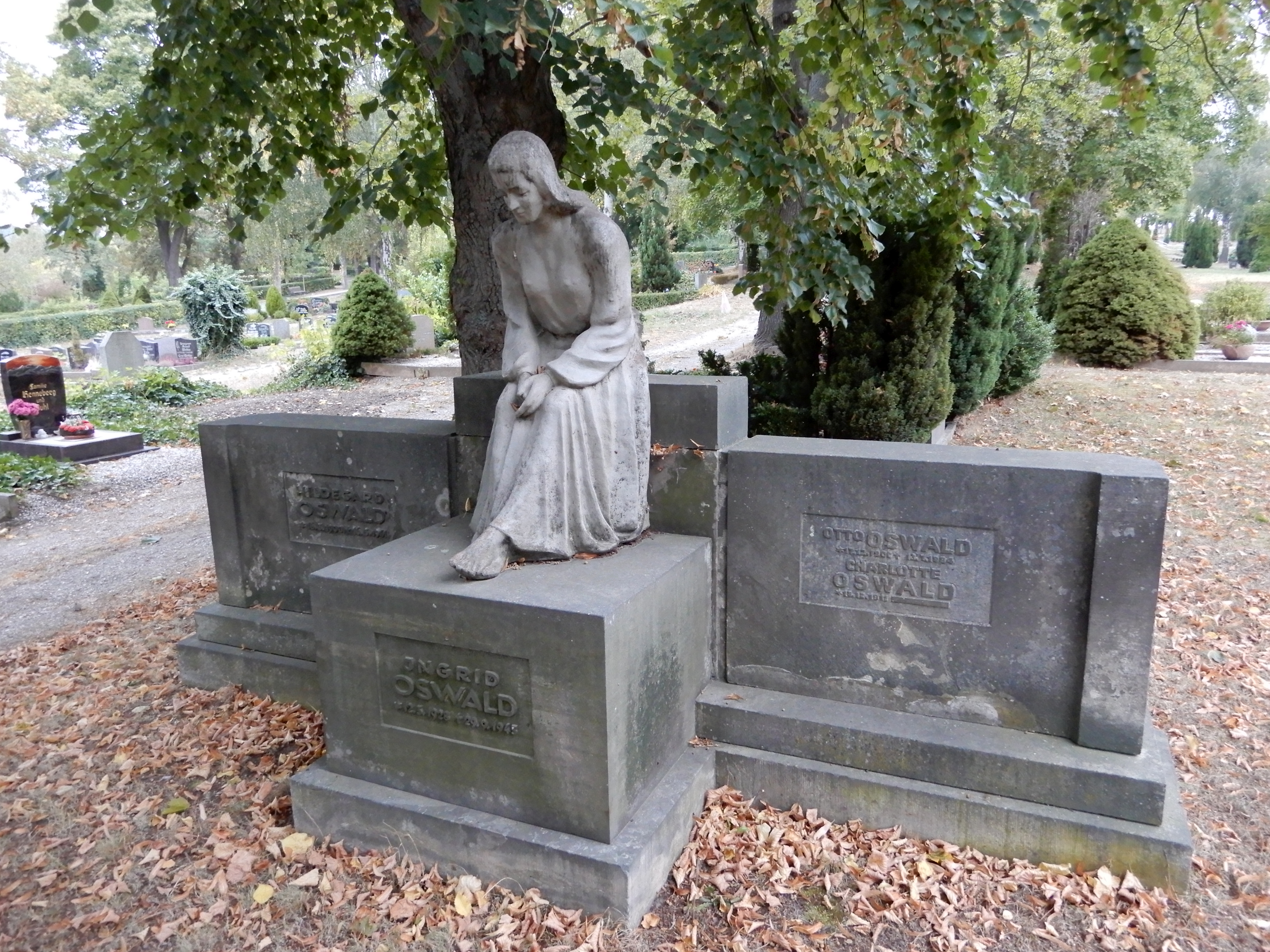 Grabmal auf dem Friedhof Thale